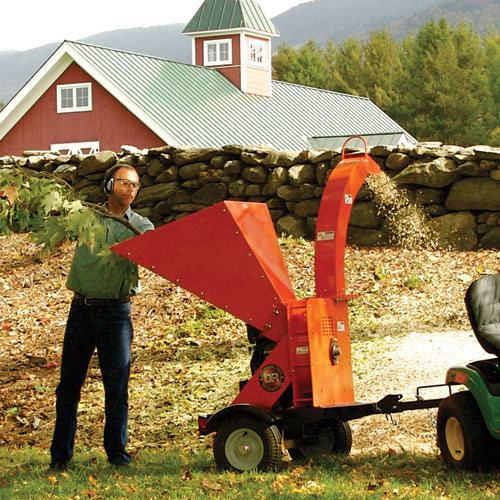 Измельчитель веток